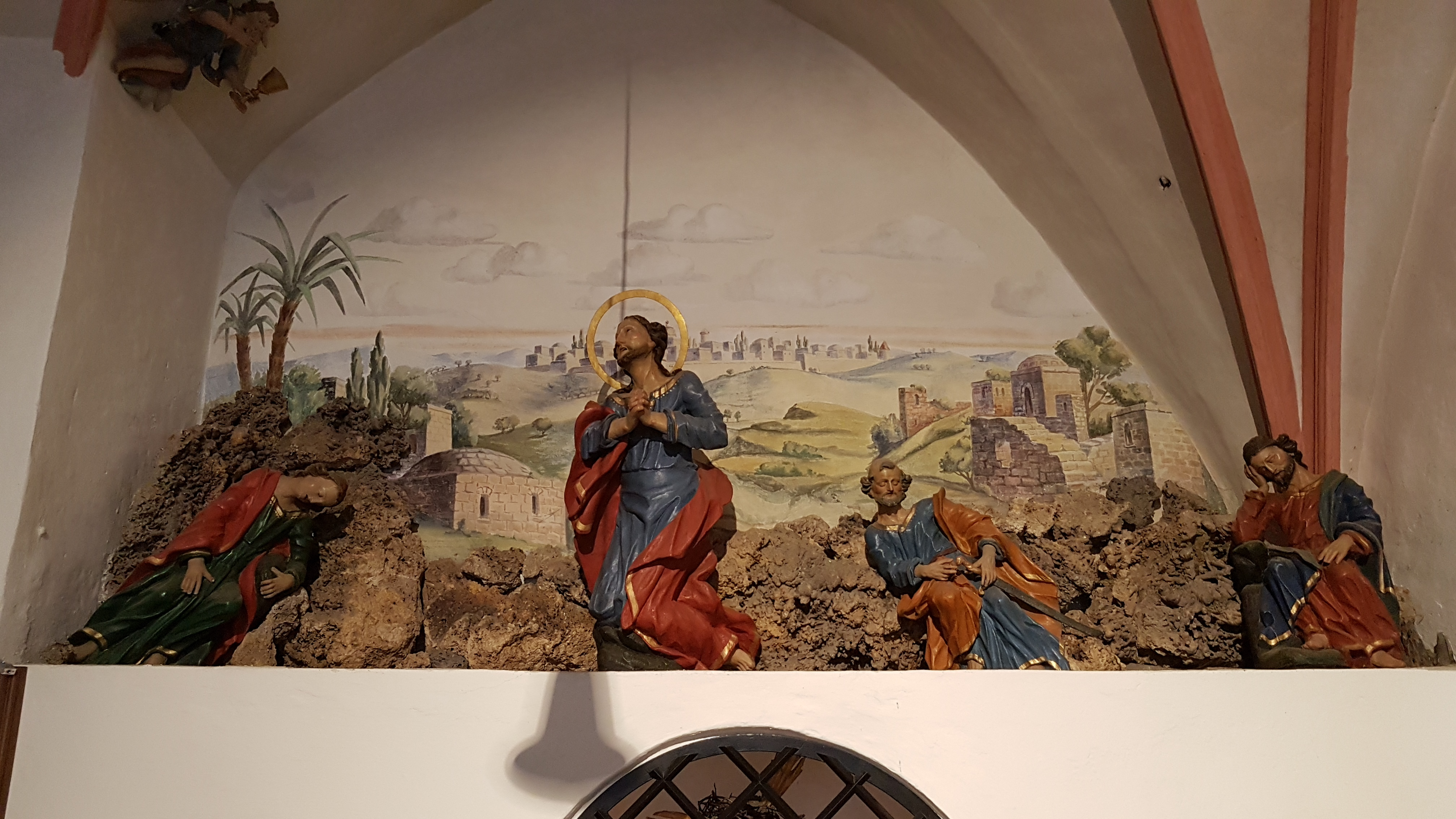 St. Johann der Täufer (Petting)